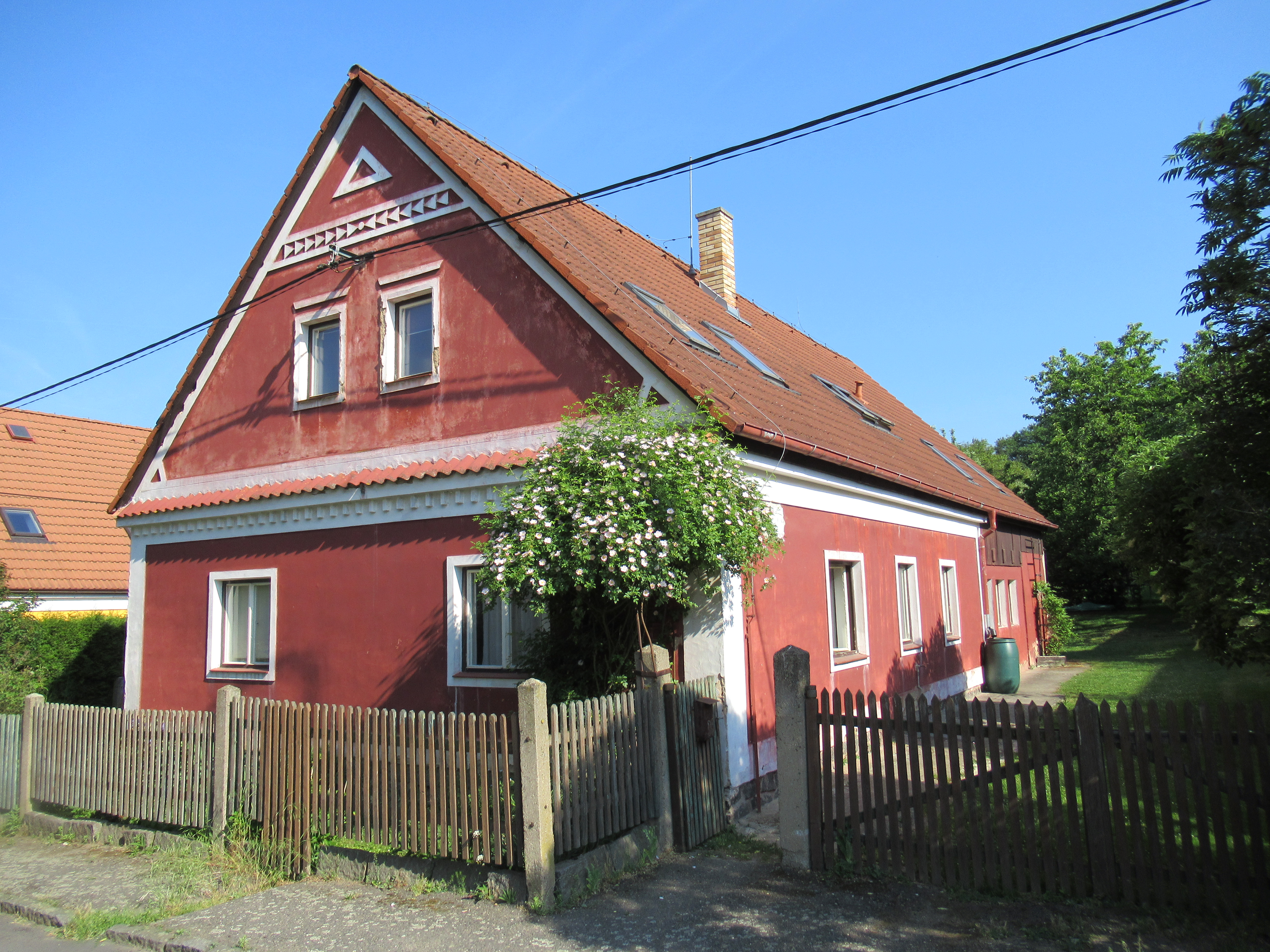 jeden z domů nově vybudovaných Zcírotic